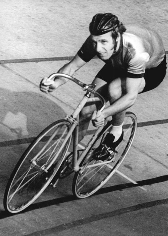 Uwe Unterwalder ADN-ZB Gahlbeck 23.5.76 - Mailand: Hallenweltbestzeit durch Uwe Unterwalder - Höhepunkt im dritten und letzten Länderkampf der DDR-Bahnradsportler während ihres Aufenthaltes in Italien war auf der Holzpiste des neuen Mailänder Sprtpalastes am 22.5.76 die neue Hallenweltmeisterzeit, die Uwe Unterwalder vom TSC Berlin ( Foto von einem früheren WEttkampf) im 4000-m-Einzel-Verfolgungsfahren mit 4:47,34 min erzielte. Siehe ADN-Meldung v. 23.5.76